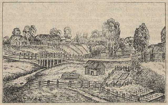 Беларуская (тарашкевіца): Грэск (Hresk), рака Сава (Sava). Агульны выгляд з Замчышча